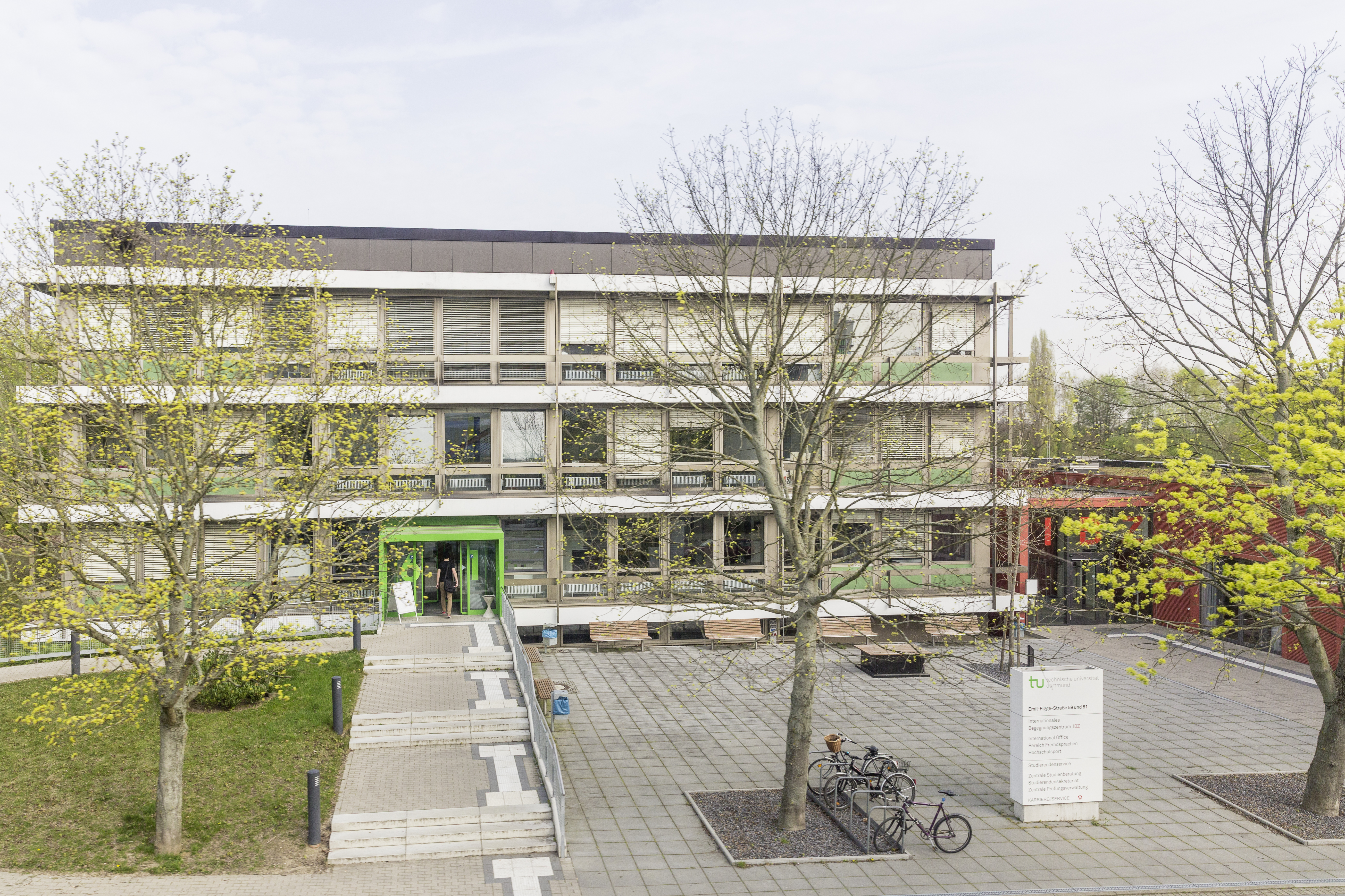 Foto des Gebäudes in dem der Bereich Fremdsprachen des Zentrum für HochschulBildung in Dortmund verortet ist.